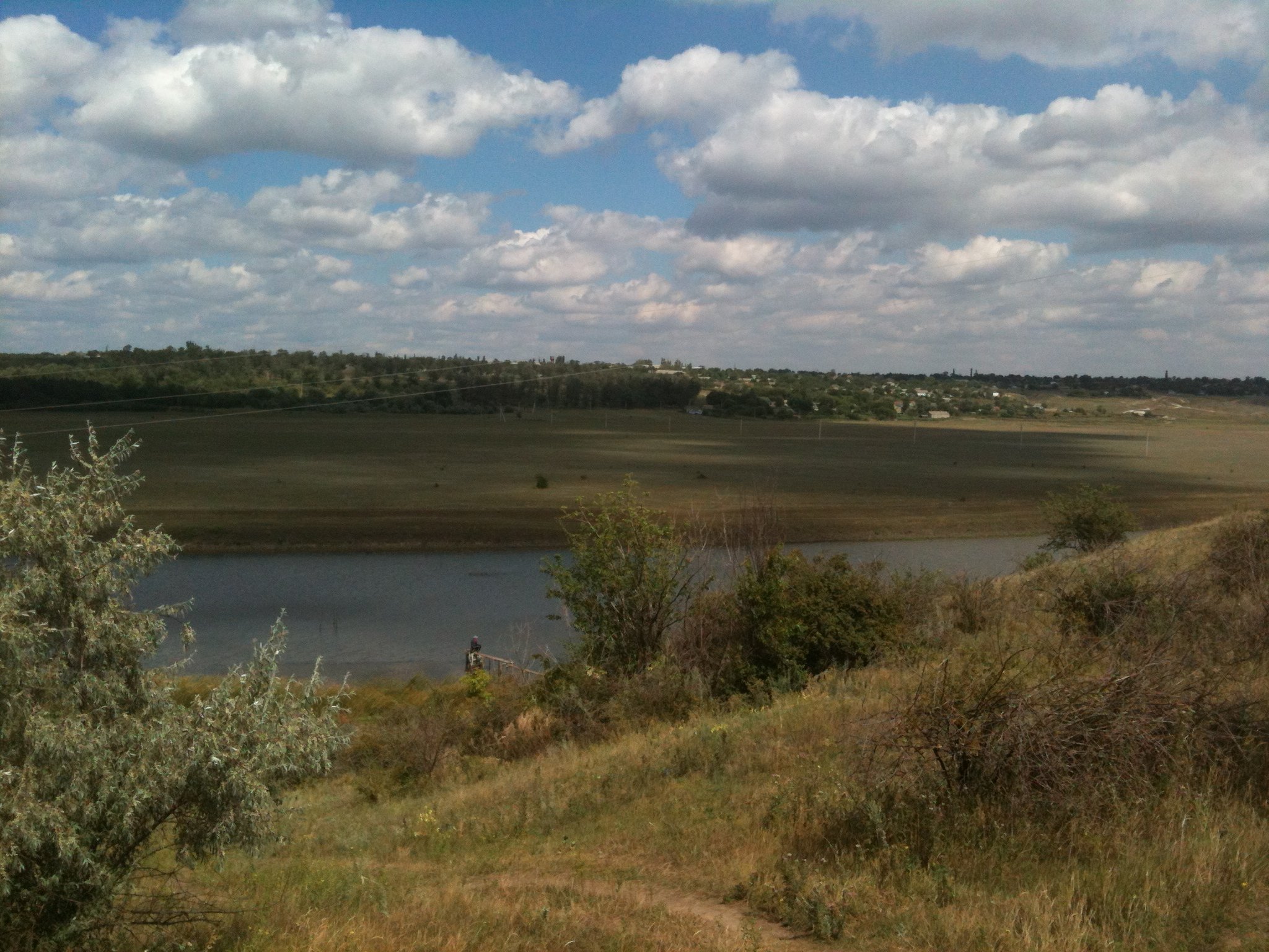 Павлівка (фото зроблено з боку Снігурівки, на правому березі Інгульця)